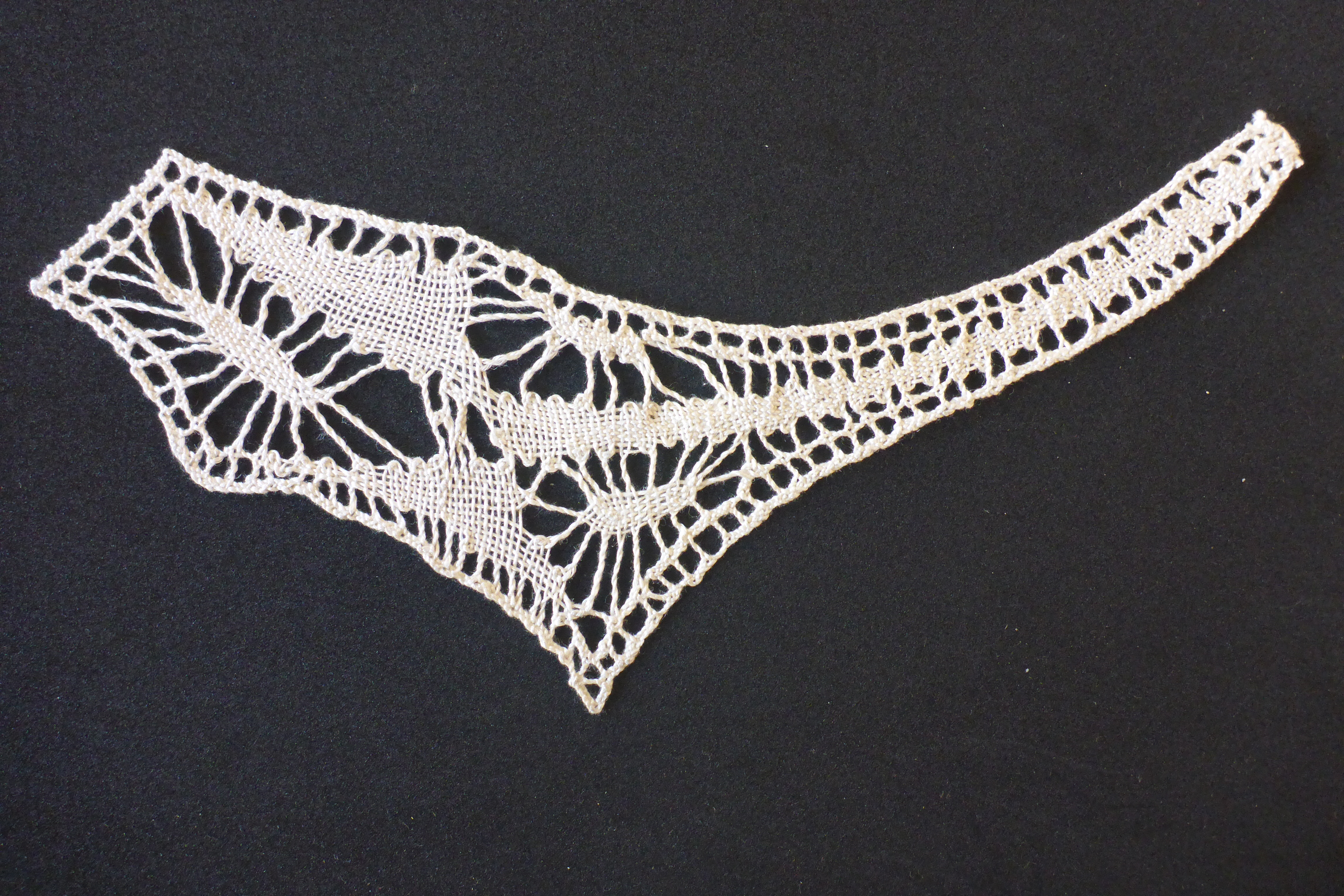 Klöppelspitze